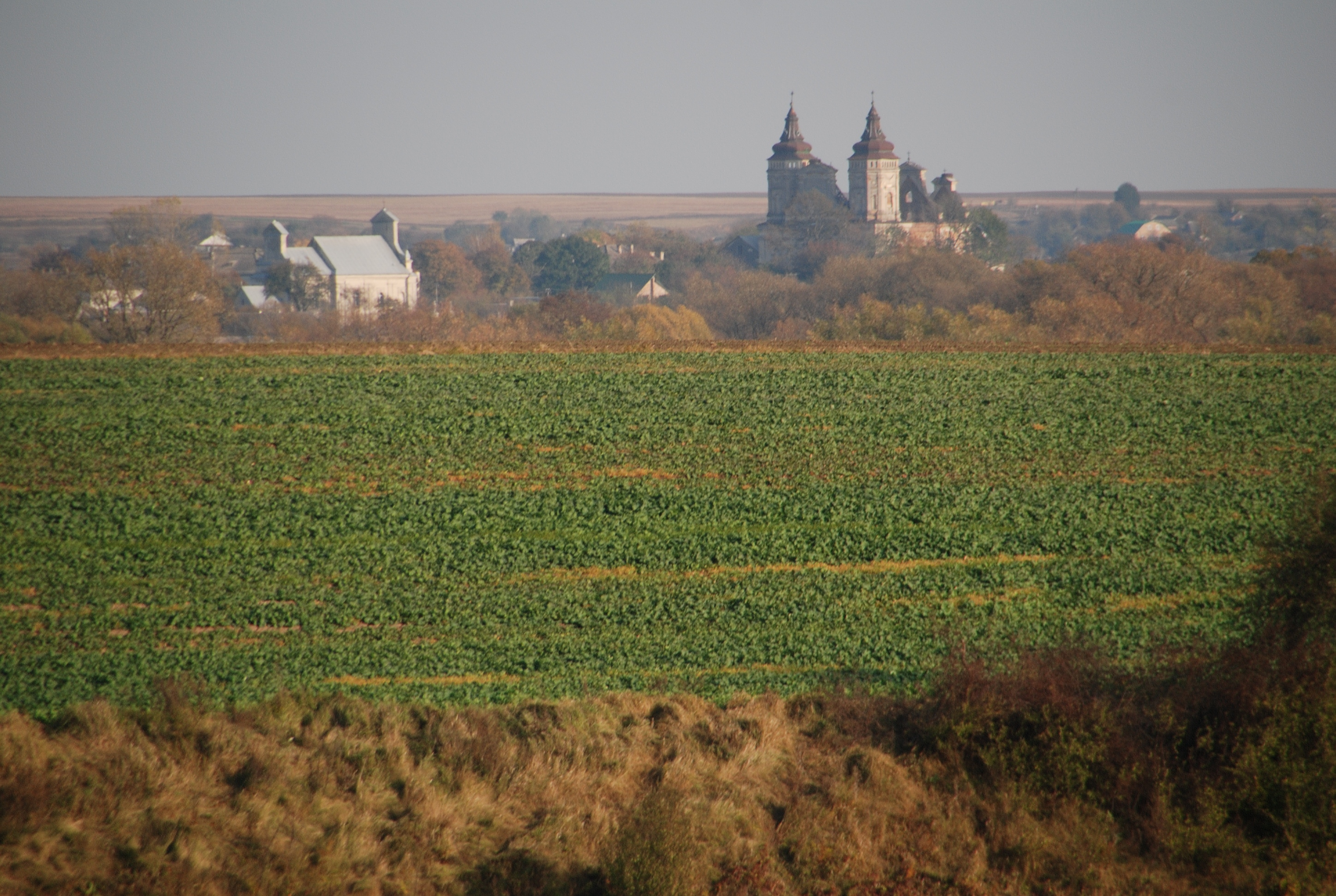 miejscowość